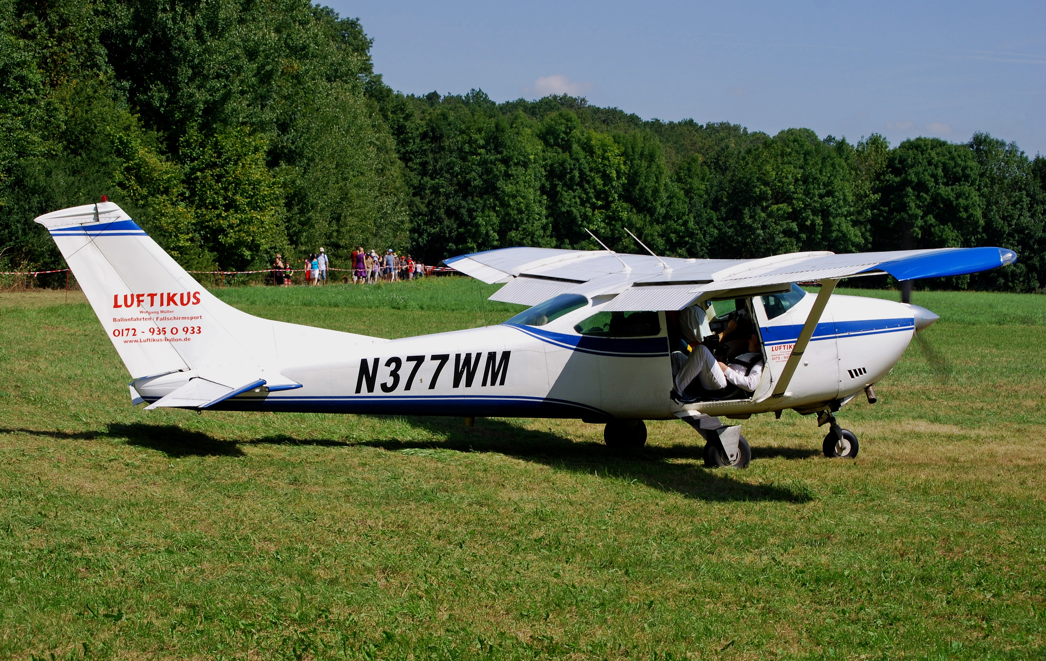 Eine Cessna 182N Skylane beim Flugfest in Löchgau 2010